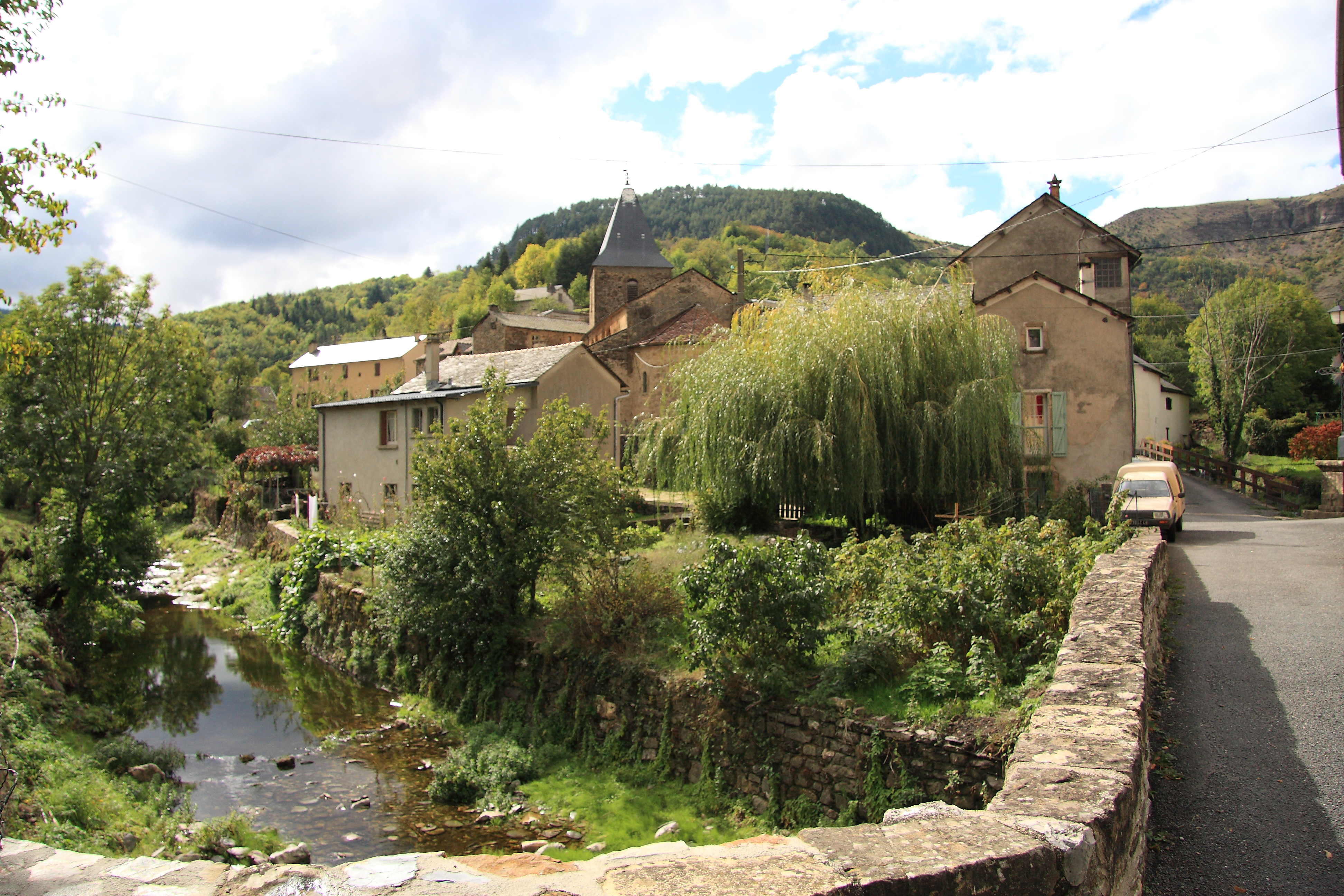 Fraissinet-de-Fourques